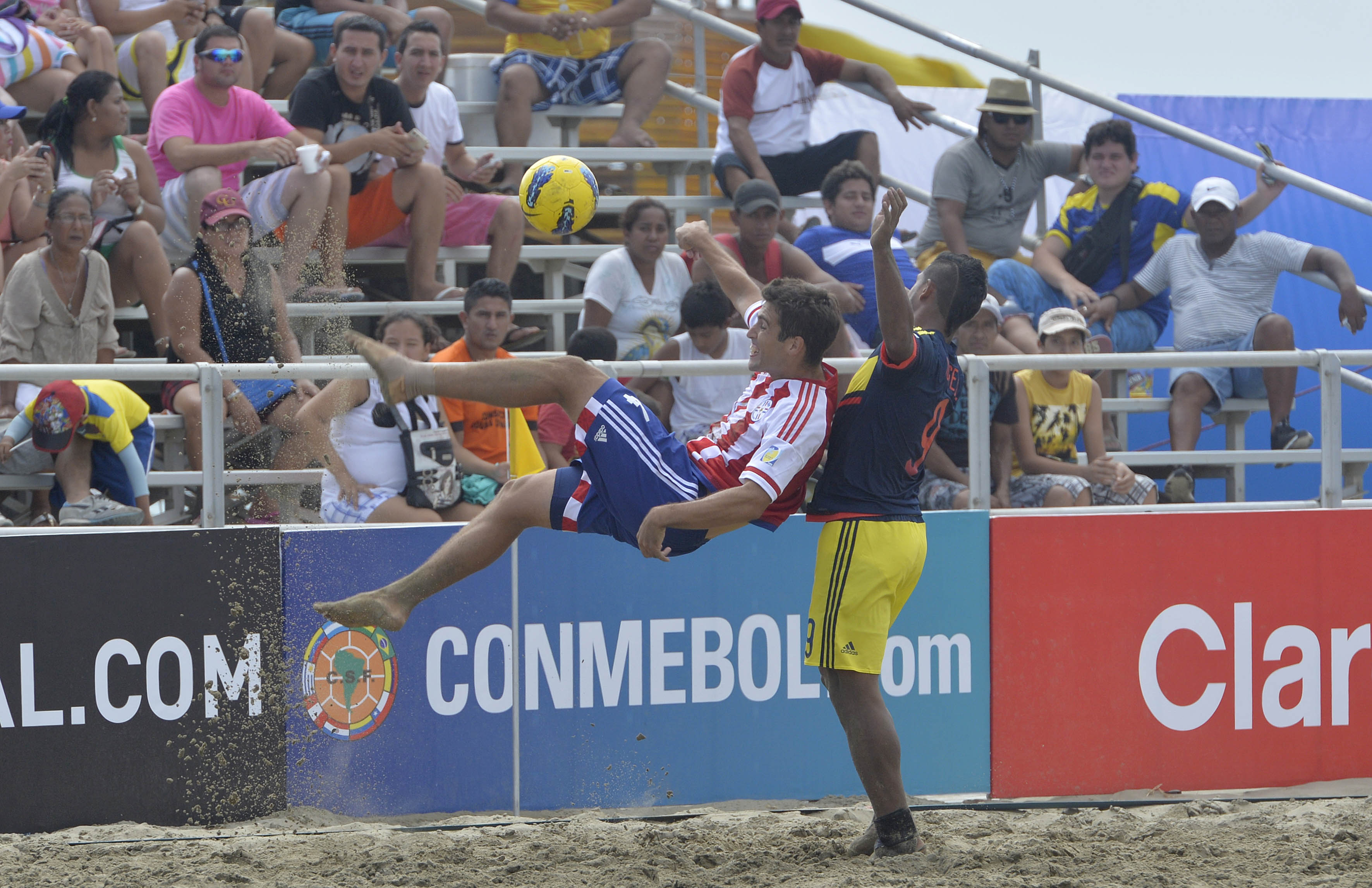 Manta, domingo 19 de abril del 2015 (ANDES).-En Manta se desarrolla el Campeonato Sudamericano de Fútbol de Playa. En la gráfica el partido entre Colombia y Paraguay Foto:César Muñoz/ANDES